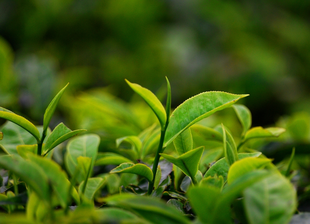 തേയില / Tea Plant / Camellia sinensis